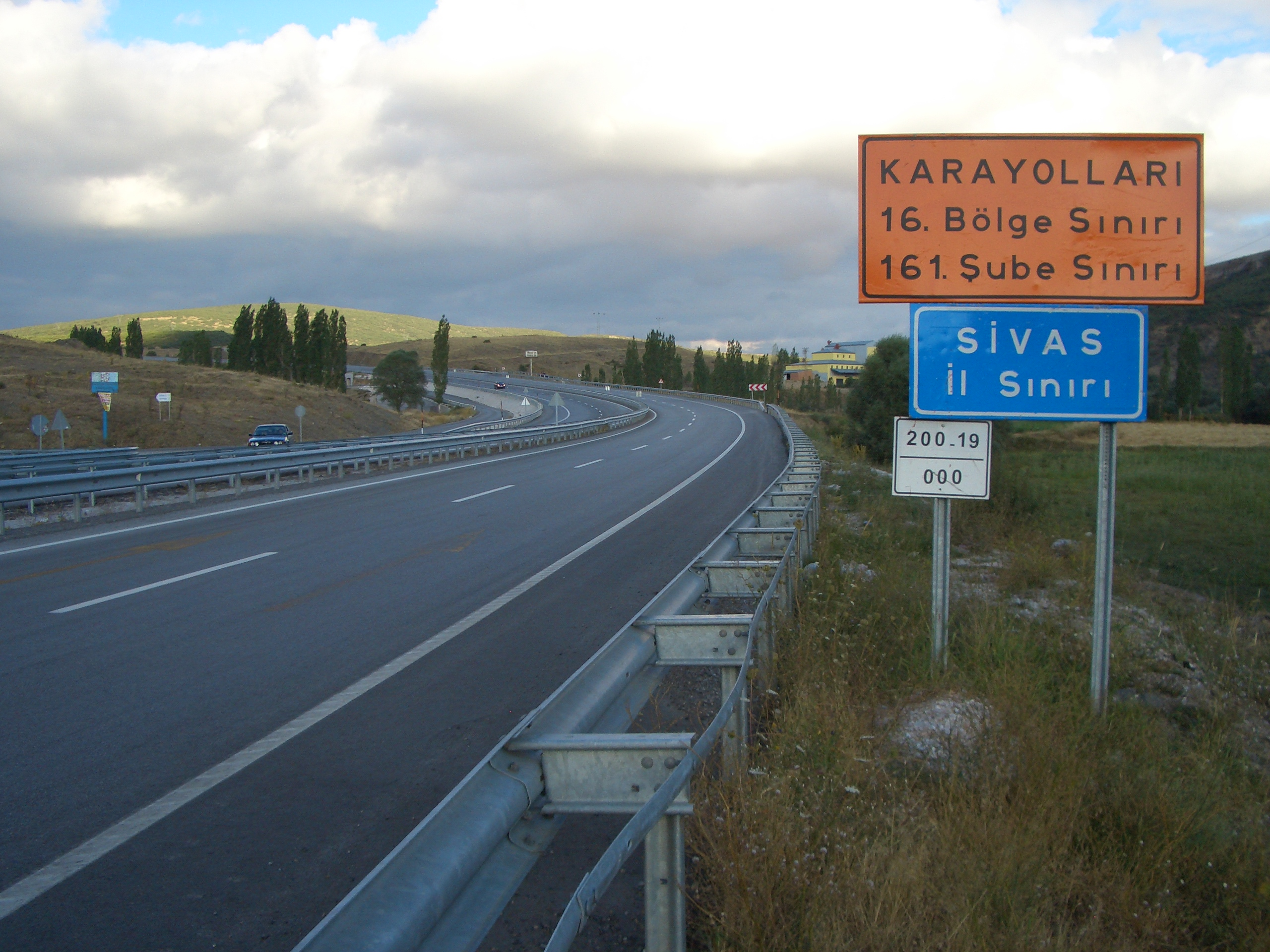 Sivas-Yozgat il sınırı.